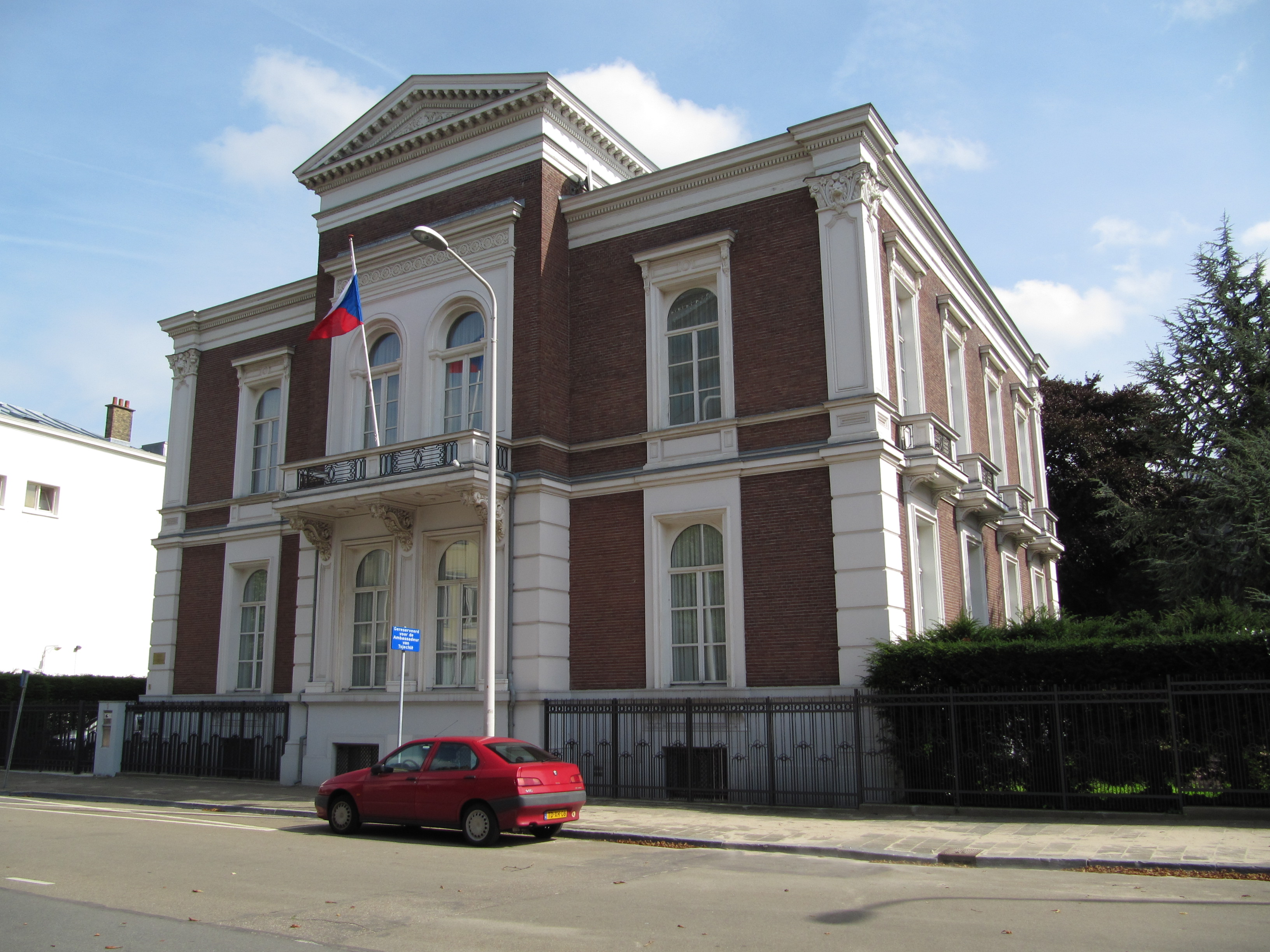 RM475929 Den Haag - Burgemeester van Karnebeeklaan 1.jpg